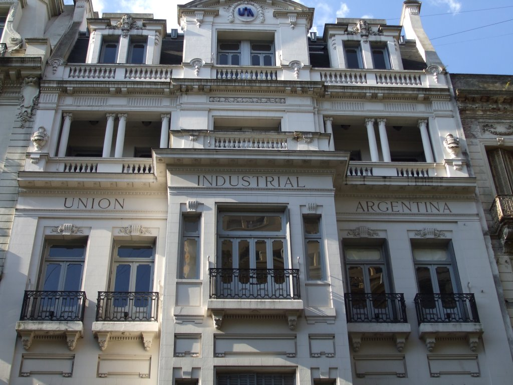 Sede de la Unión Industrial Argentina. Avenida de Mayo 1147, Buenos Aires.